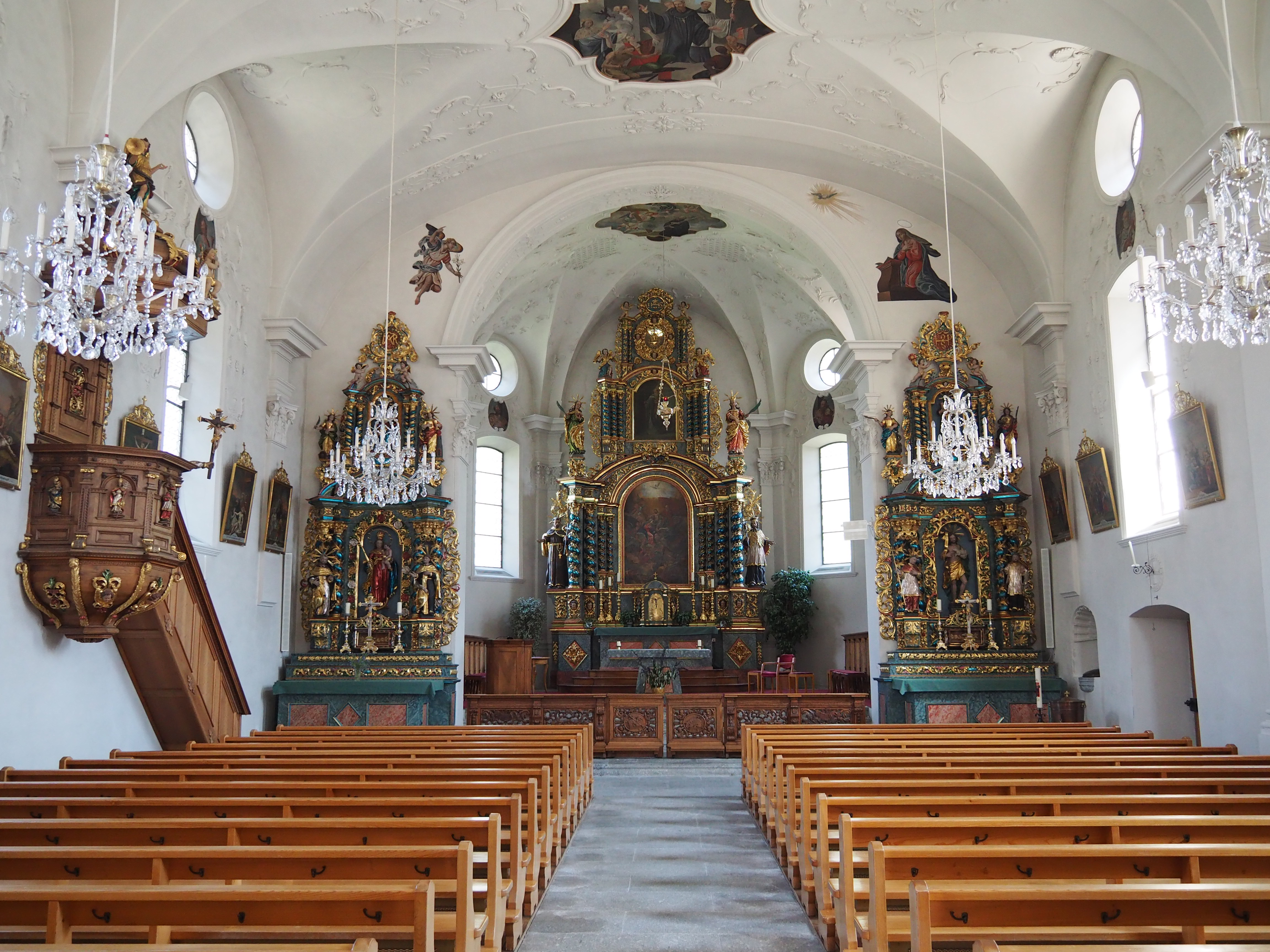 Innenraum der St. Galluskirche in Wassen, UR, Schweiz (1735 erbaut)